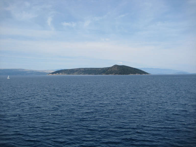 Plavnik, Croatia